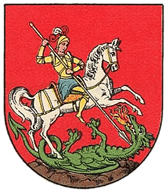 Wappen von Kahlenbergerdorf (bis 1892 eine eigenständige Gemeinde und ist heute ein Stadtteil Wiens im 19. Wiener Gemeindebezirk Döbling): Sankt Georg mit dem Drachen.